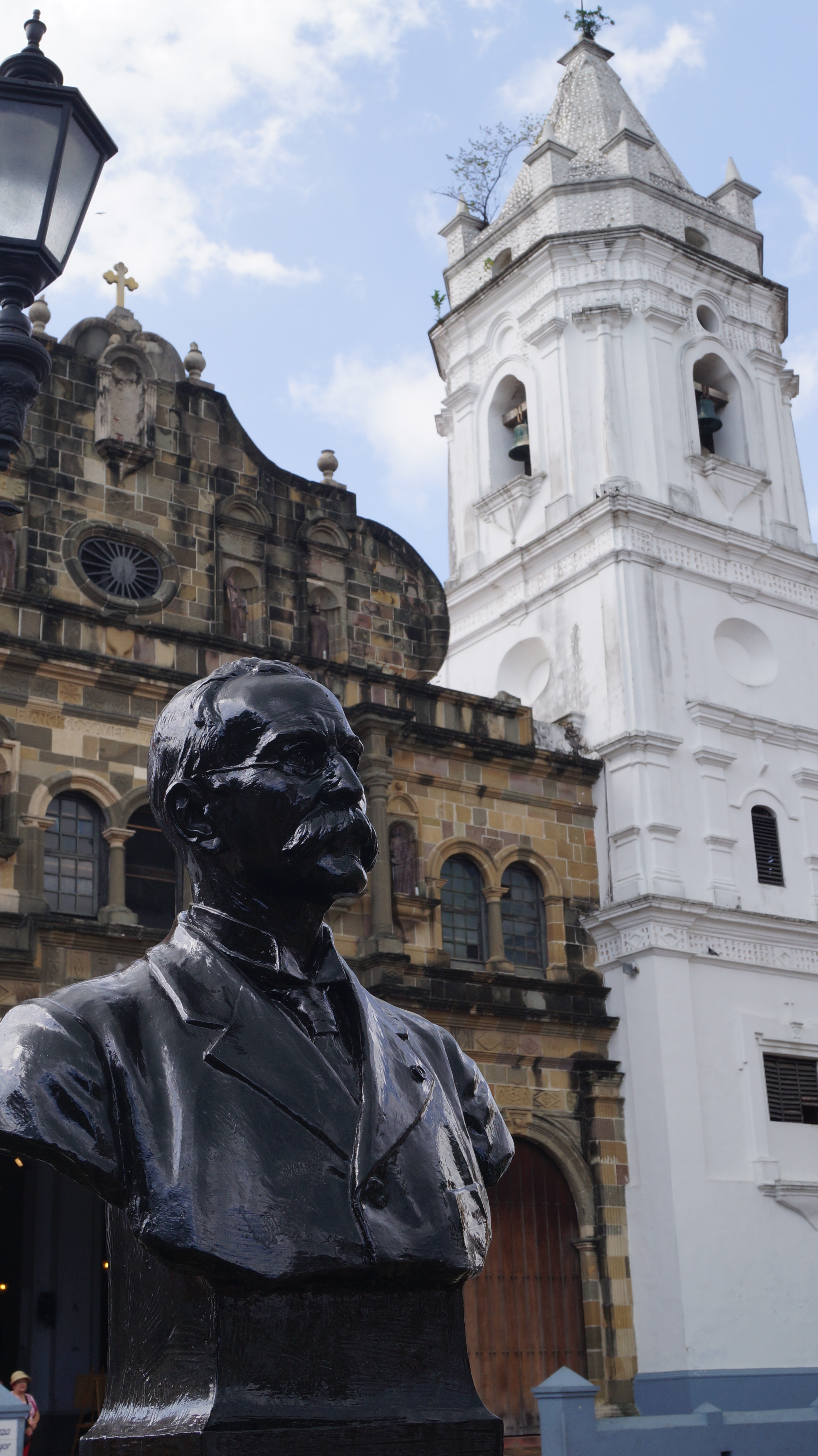 Manuel Amador Guerrero fue político y médico de nacionalidad colombiana y panameña, uno de los gestores de la separación de Panamá de Colombia, miembro de la Junta Provisional de Gobierno y primer presidente constitucional de la República de Panamá. Fecha de nacimiento: 30 de junio de 1833, Turbaco, Colombia Fecha de la muerte: 2 de mayo de 1909, Panamá Esta imagen representa la combinación de unos de los próceres de la patria con nuestra Catedral Metropolitana en el fondo como símbolo del nacional.